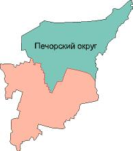 map of Pechorskij okrug (1938)